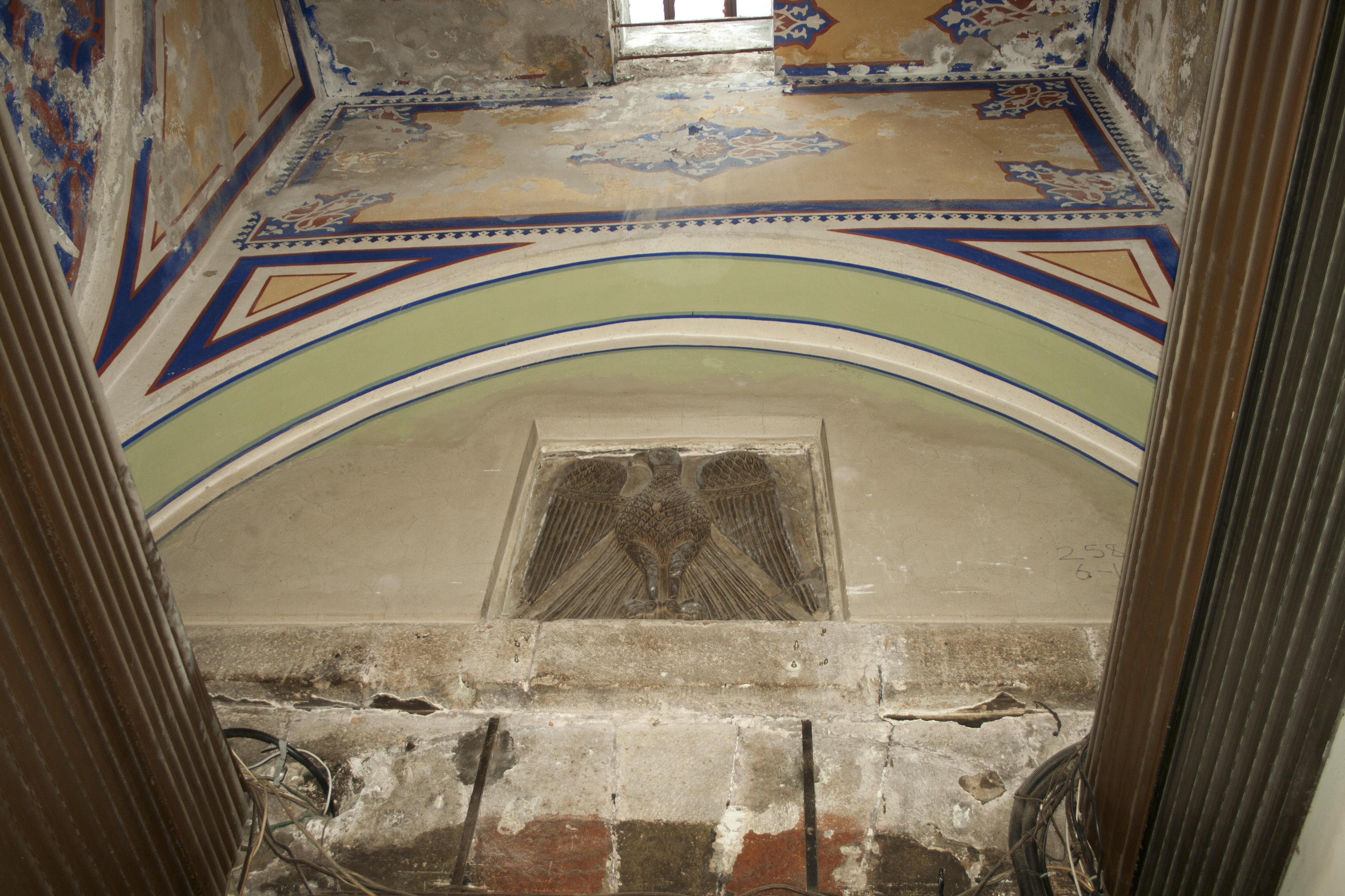 Grand Bazaar Istanbul